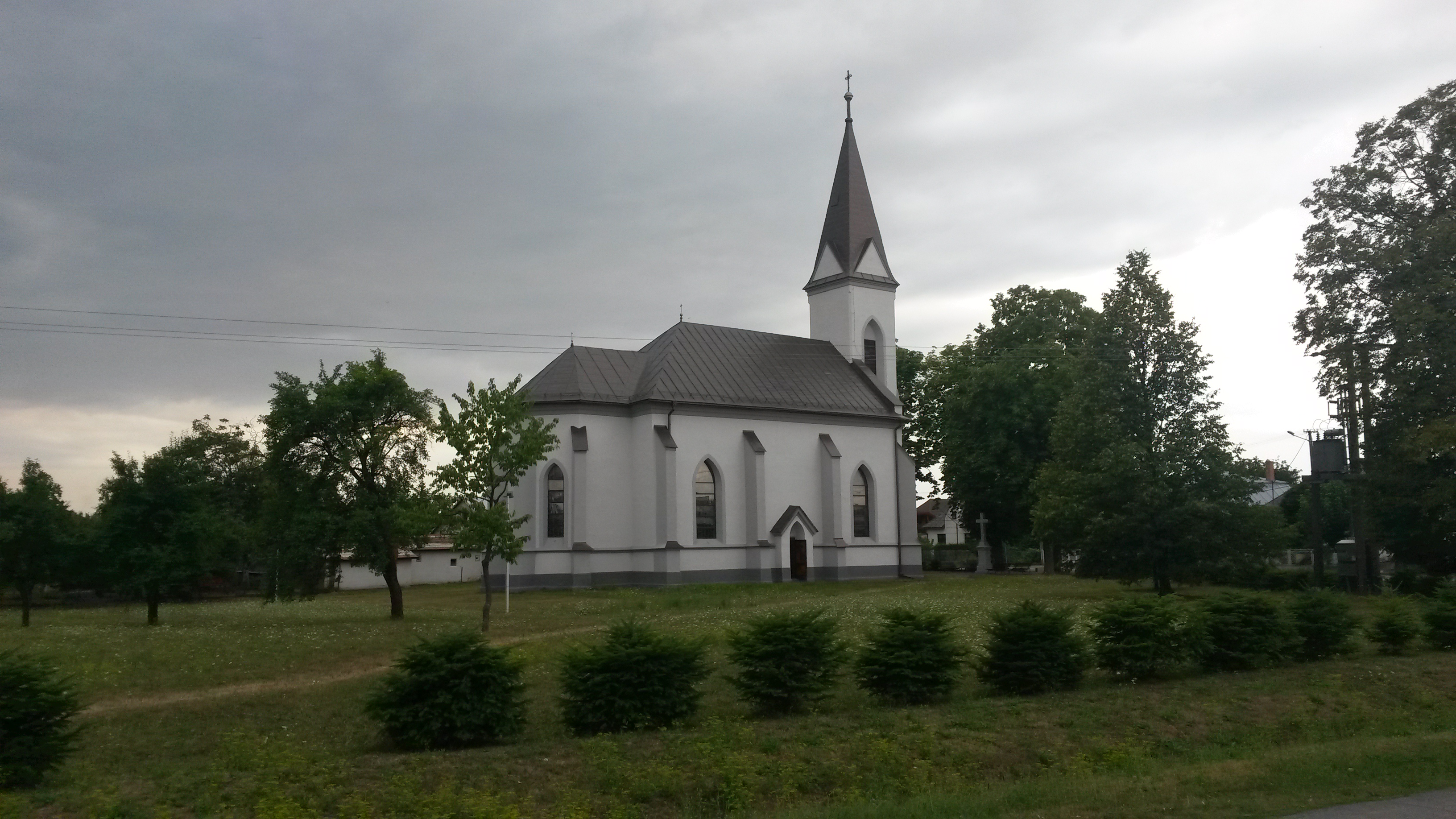 Kostol Nanebovstúpenia Pána v Ostrove